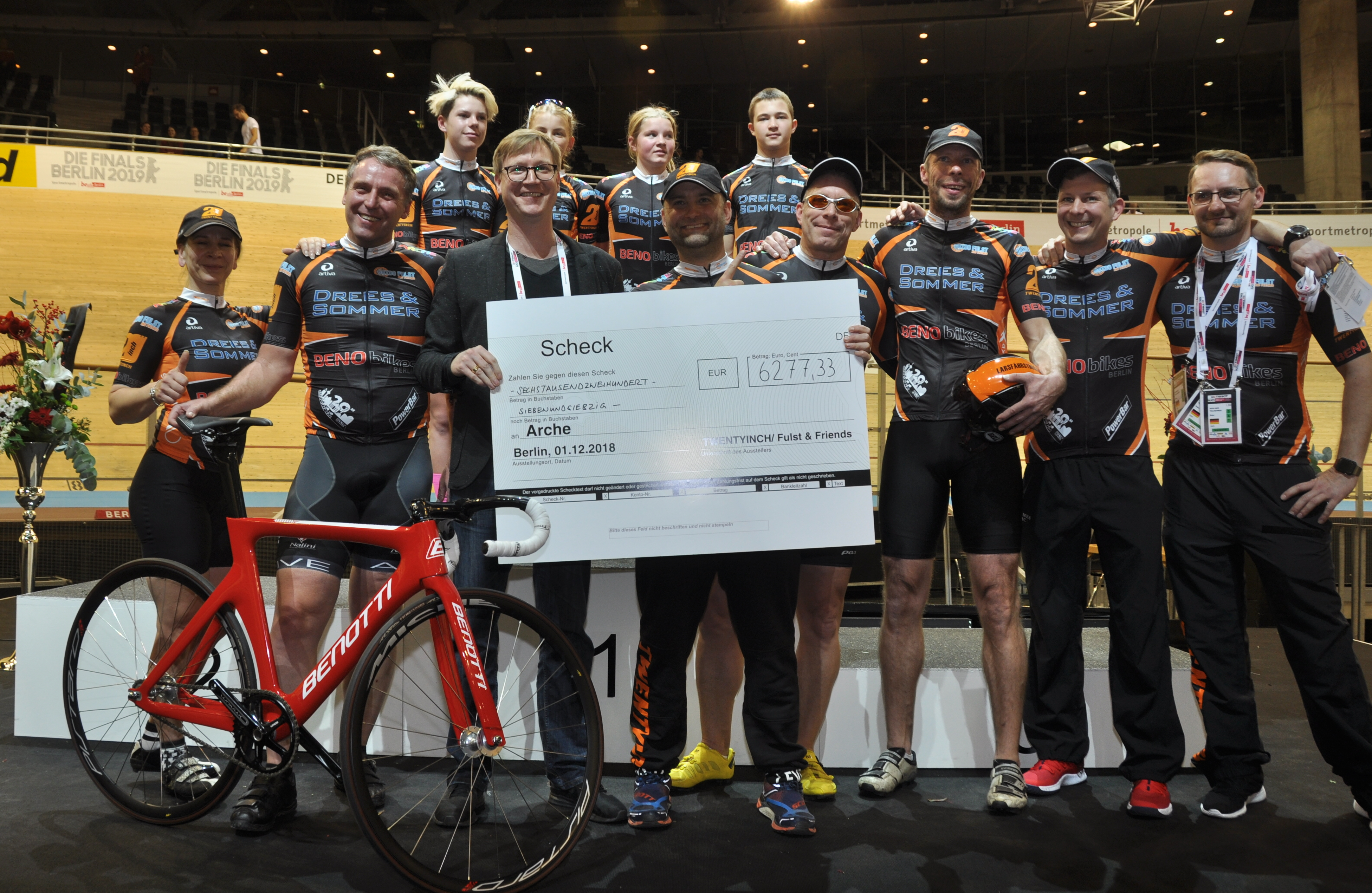 Guido Fulst (2.v.l.) und die Gruppe Twentyinch, Aktion zugunsten der "Arche"